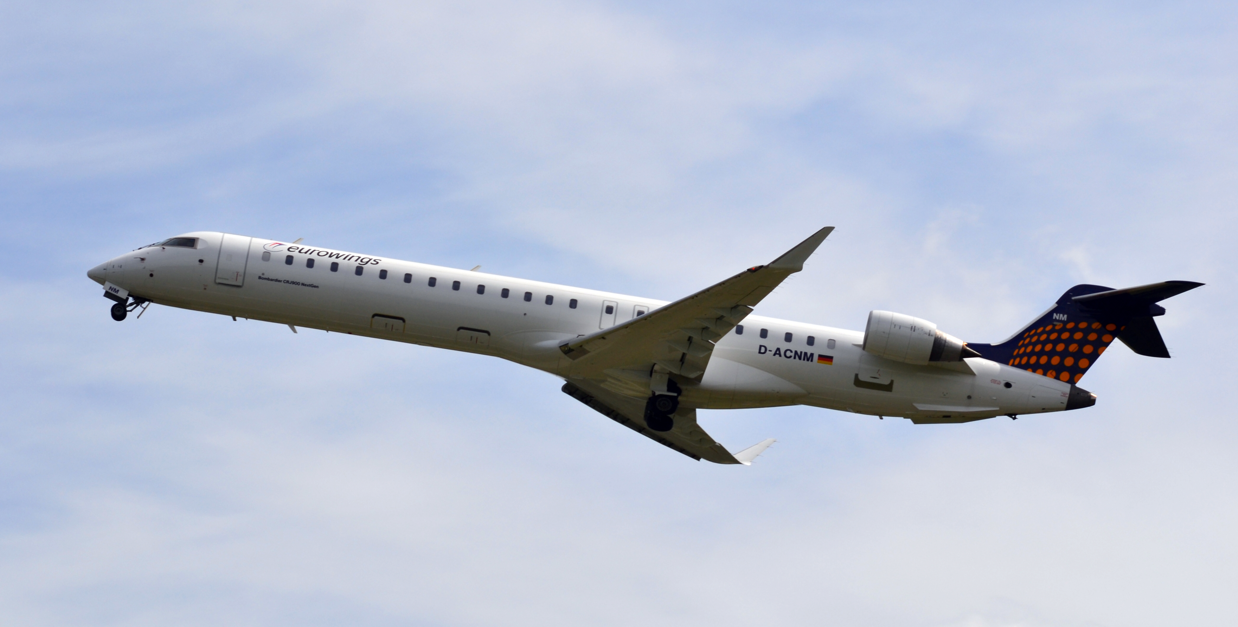 CRJ900 Next Generation(D-ACNM)